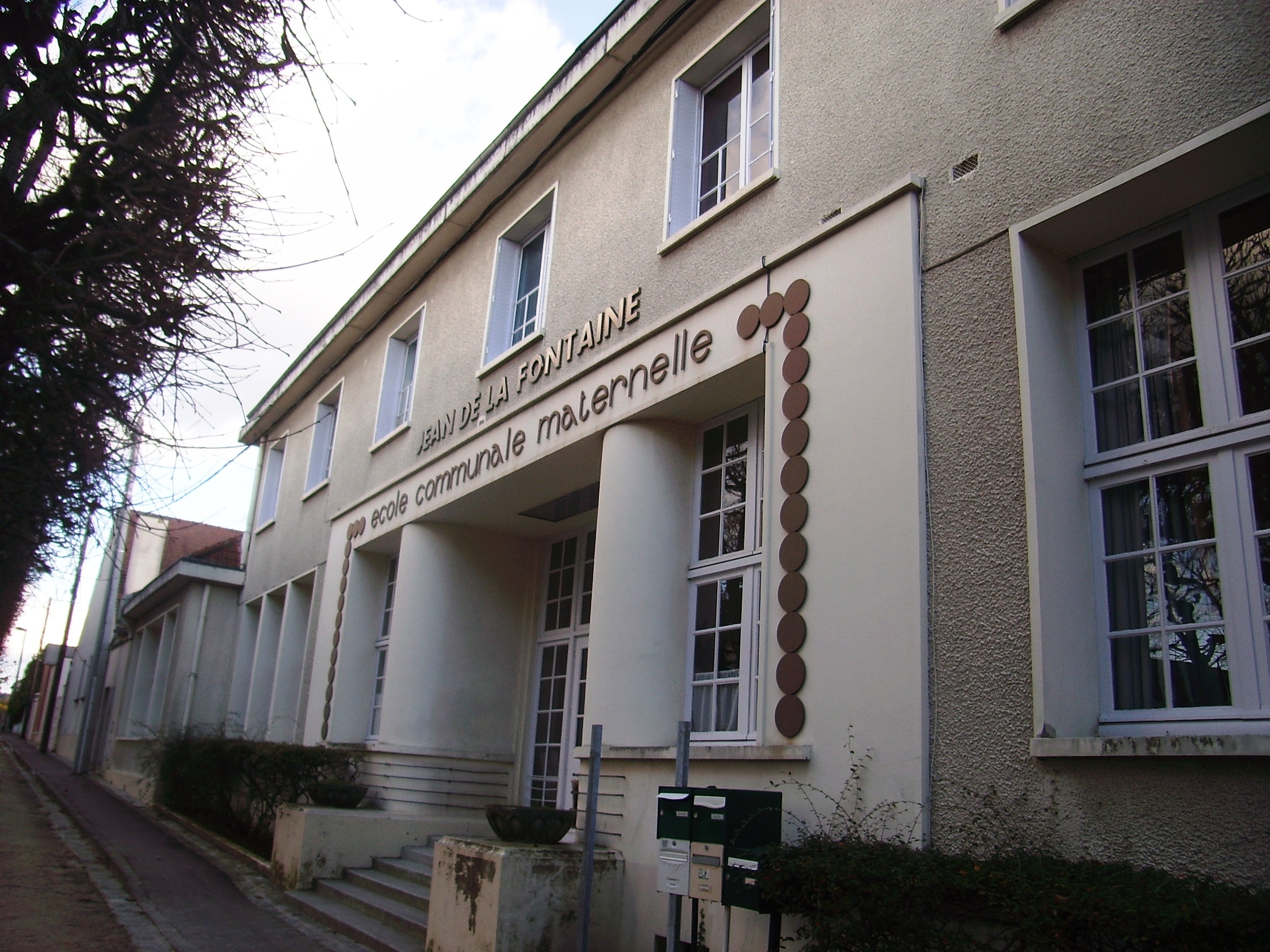 École maternelle Jean de La Fontaine à Milly-la-Forêt (91)